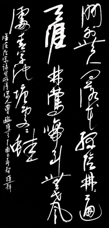 曹豳诗